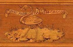 Stdiolo di guidobaldo da montefeltro